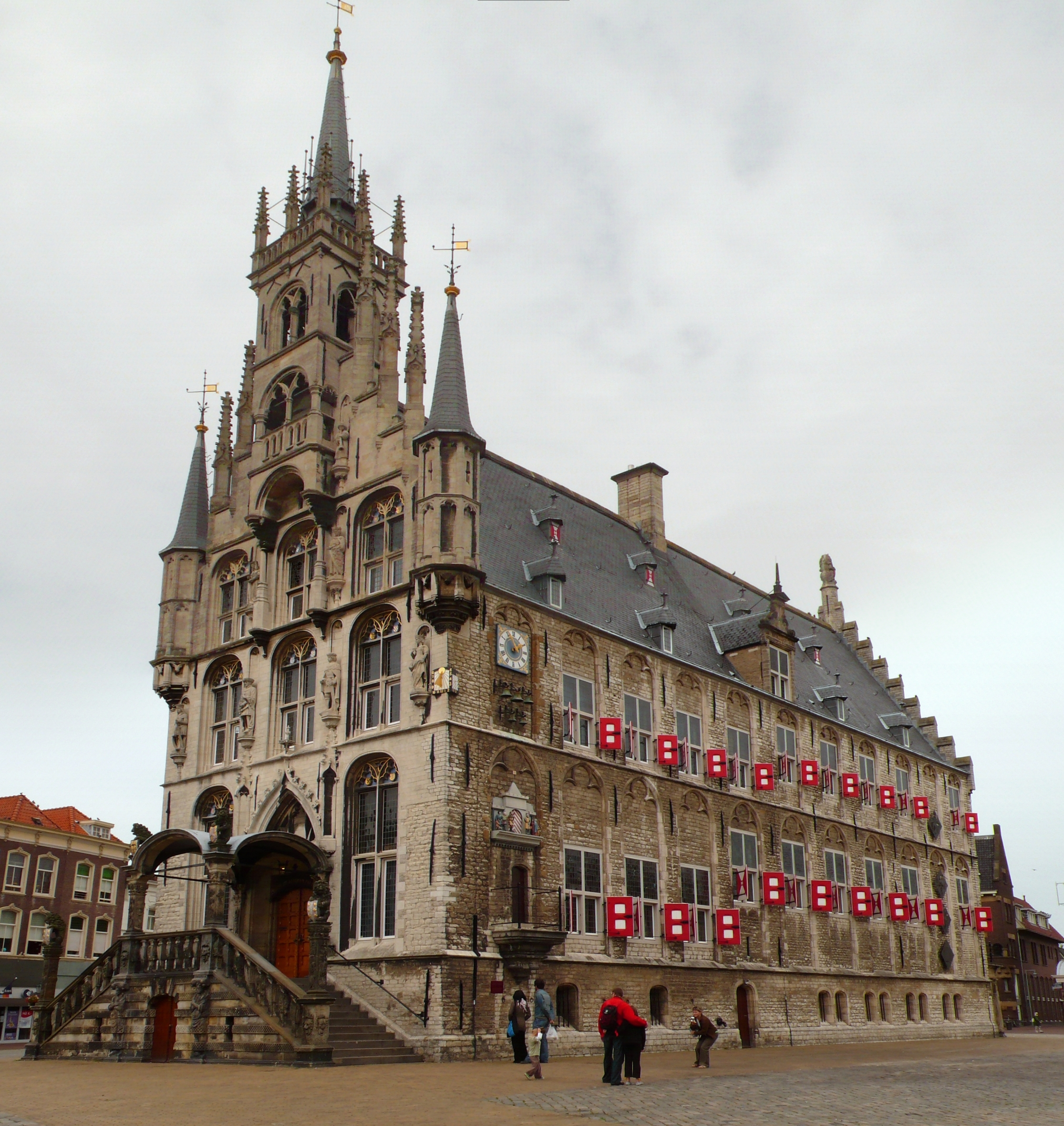 Gouda, Niederlande; Stadhuis